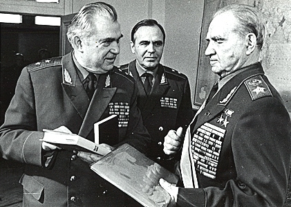 Начальник Института военной истории МО СССР П.А. Жилин с Маршалом Советского Союза В.И. Чуйковым. На втором плане - заместитель начальника Института по научной работе генерал-лейтенант М.М. Кирьян